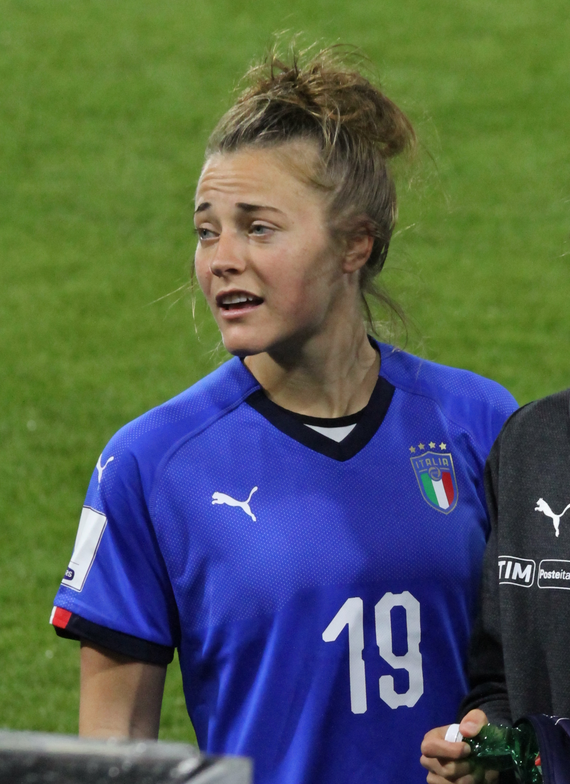 Ferrara, 10 aprile 2018: Italia vs Belgio, qualificazioni al Mondiale di Francia 2019, scatti a fine incontro. Aurora Galli.